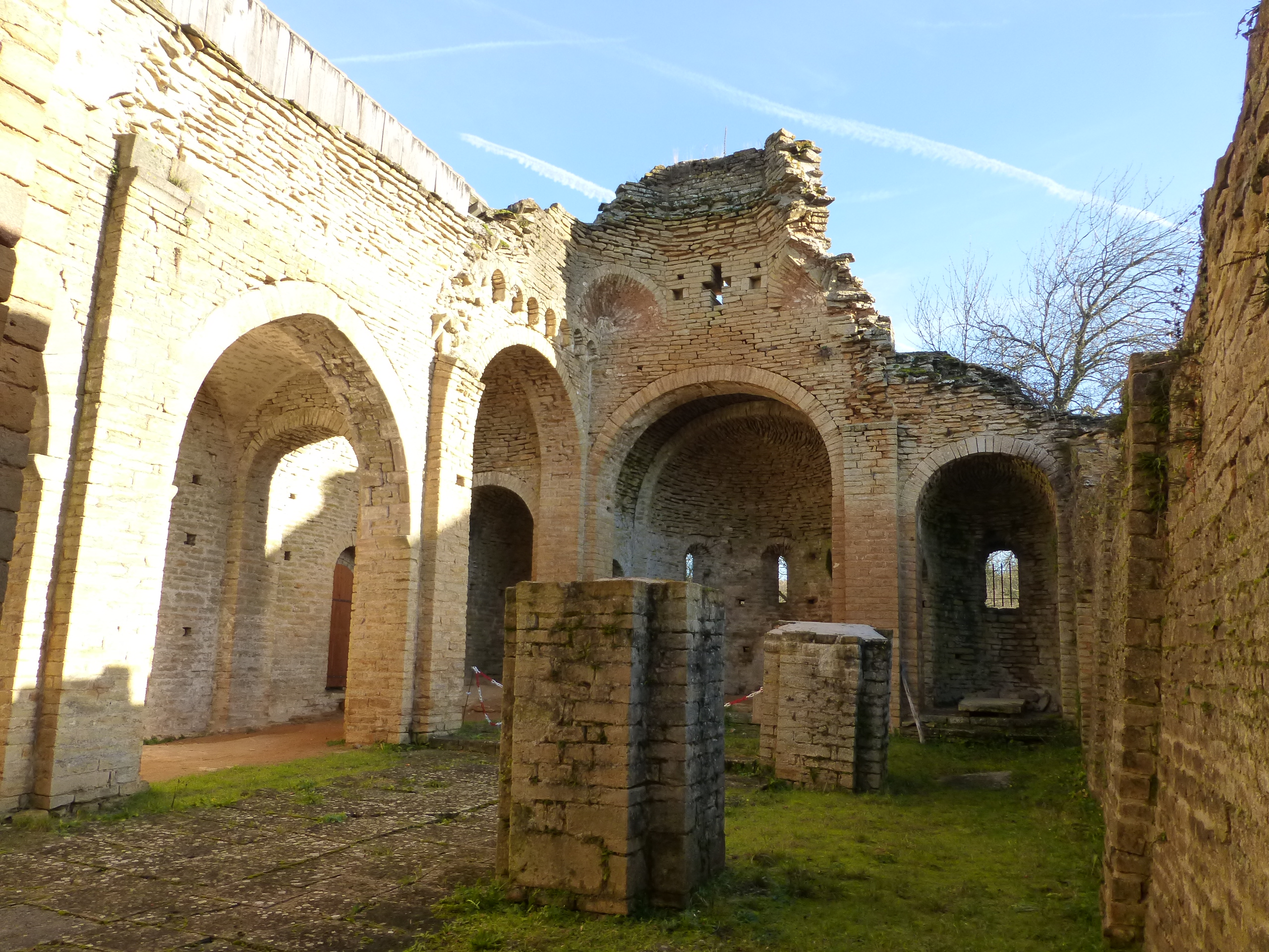 Le puley : la nef du prieuré